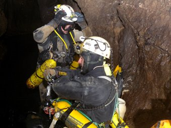 Apraiz (Busturia), 2009-V-9. ADES Espeleologia Elkarteko urpekariak (Ricardo Gutierrez eta Antonio Garcia) kobako azken sifoia esploratzen. Handik egun gutxira Goikoetxeko koba bertatik aurkituko zuten.